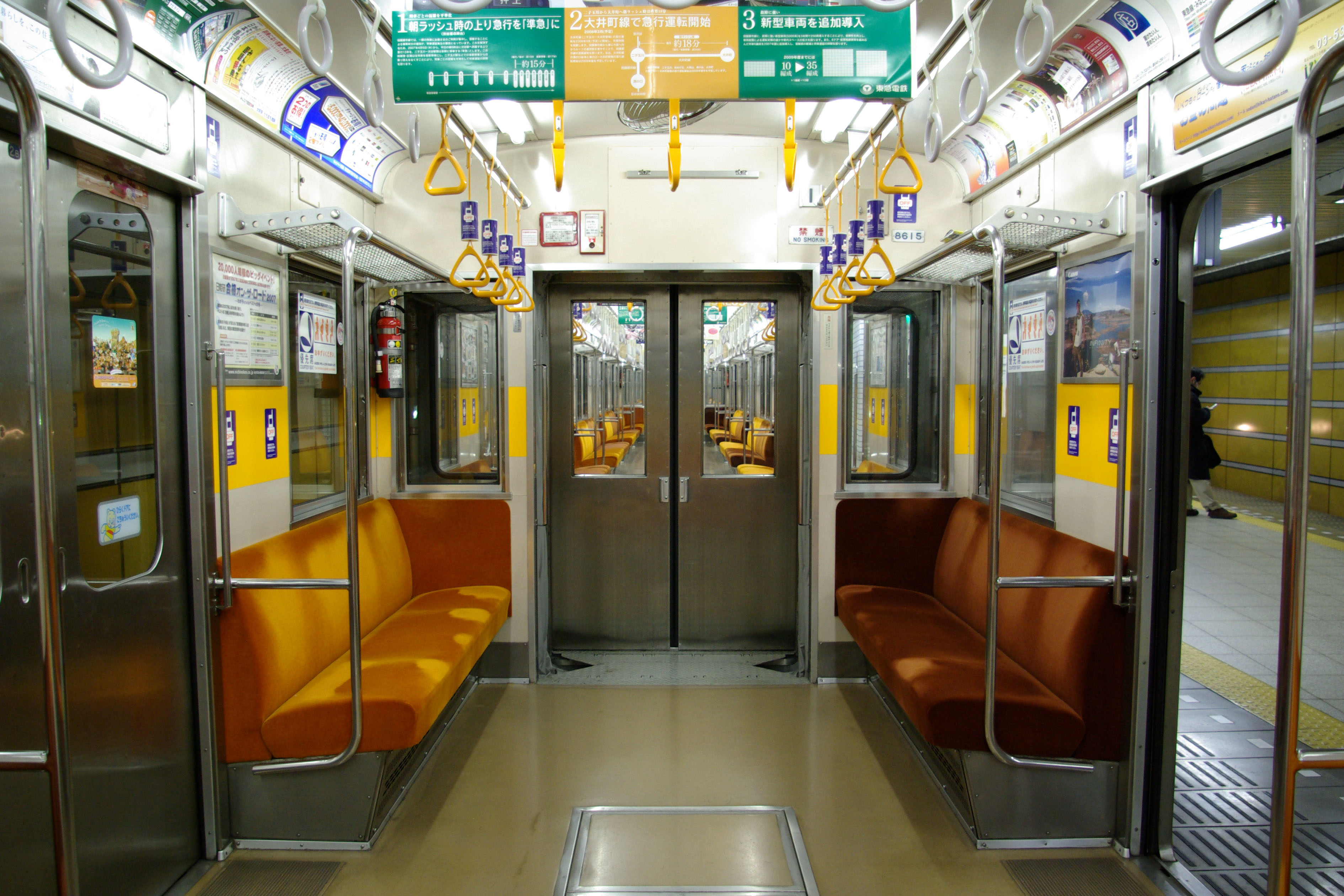 東急8500系電車 8615号の車内上り方連結面